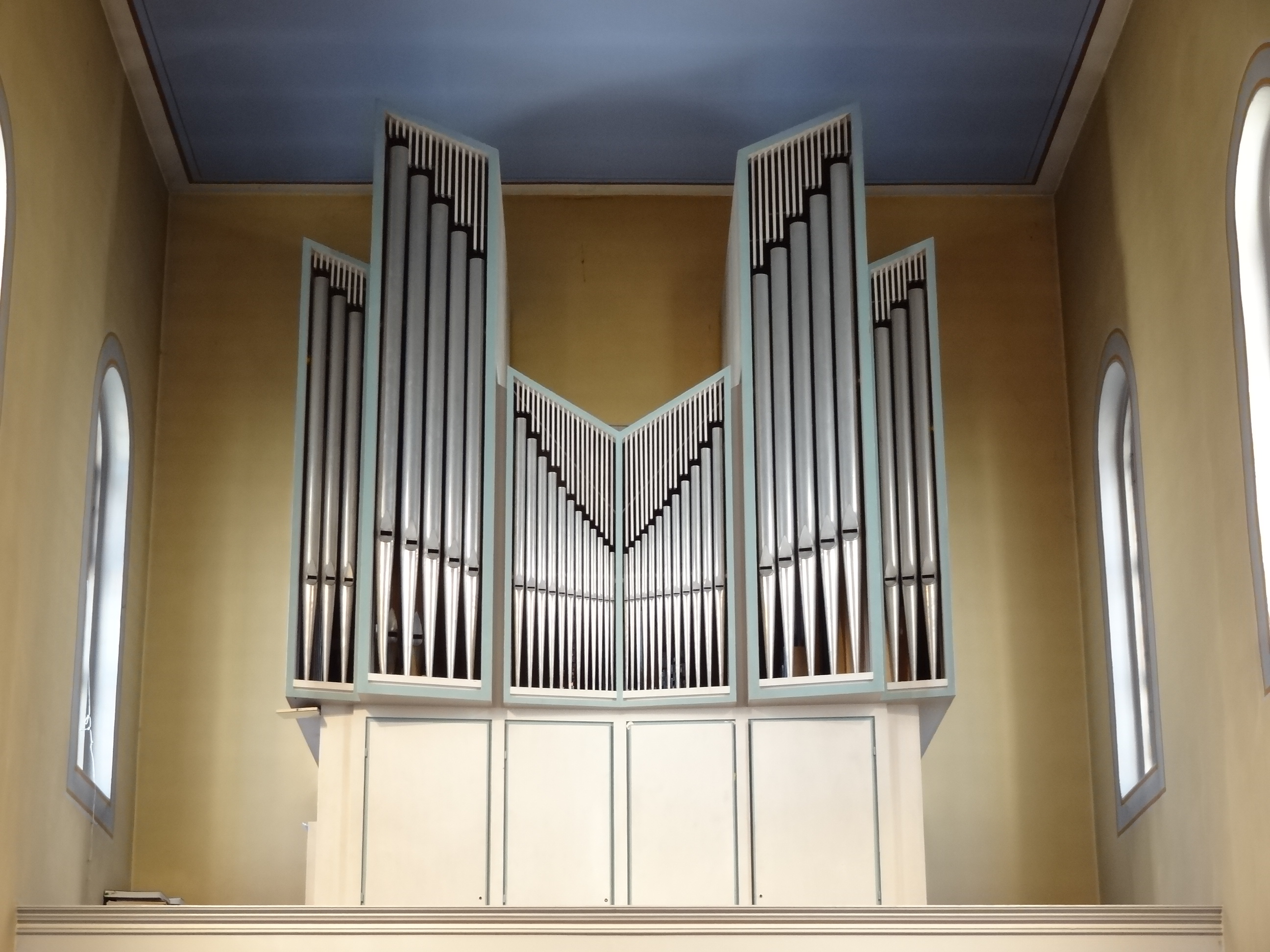 Evangelische Kirche (Kleinlinden)